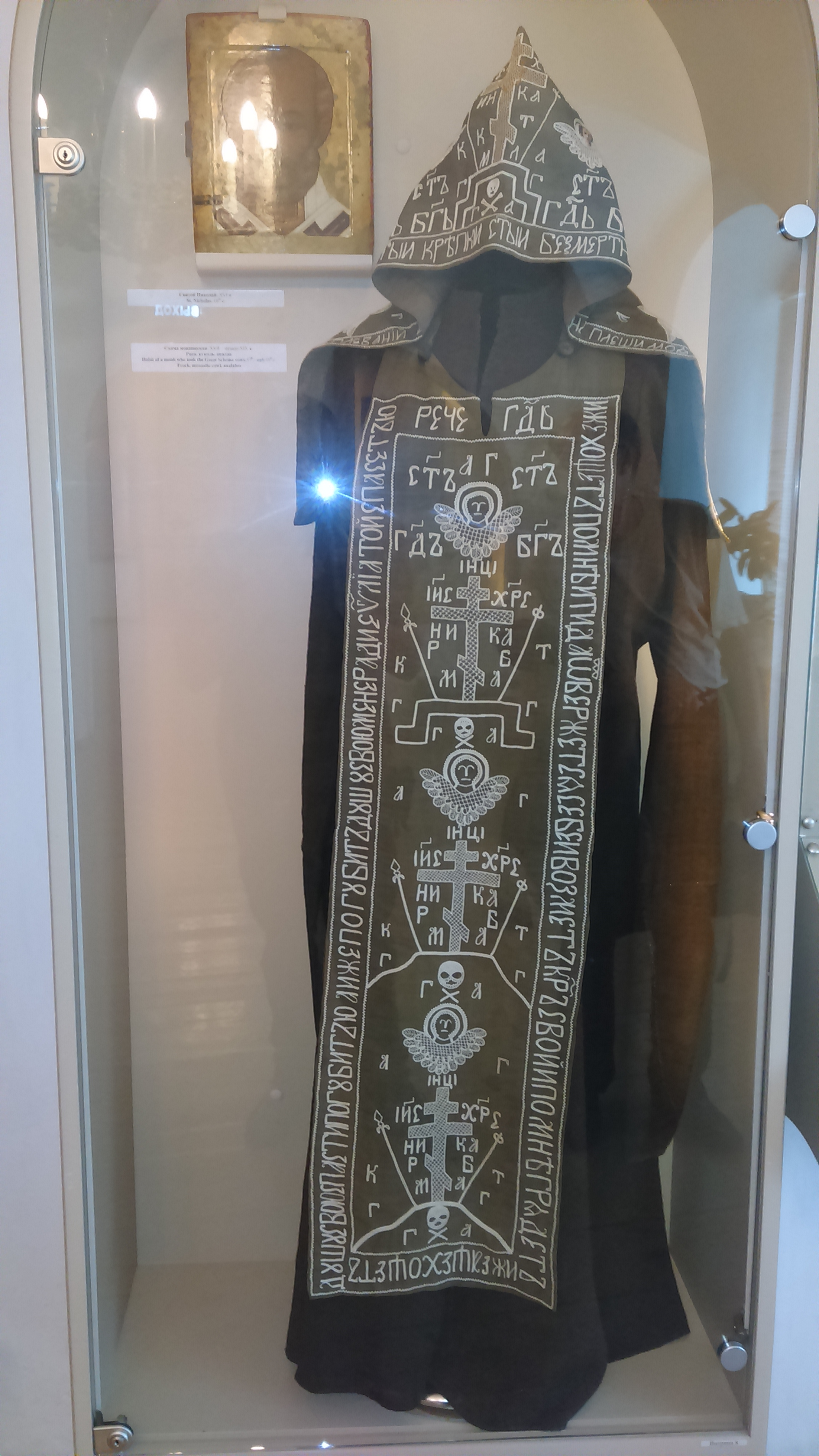 Великая схима. Суздальский музей-заповедник